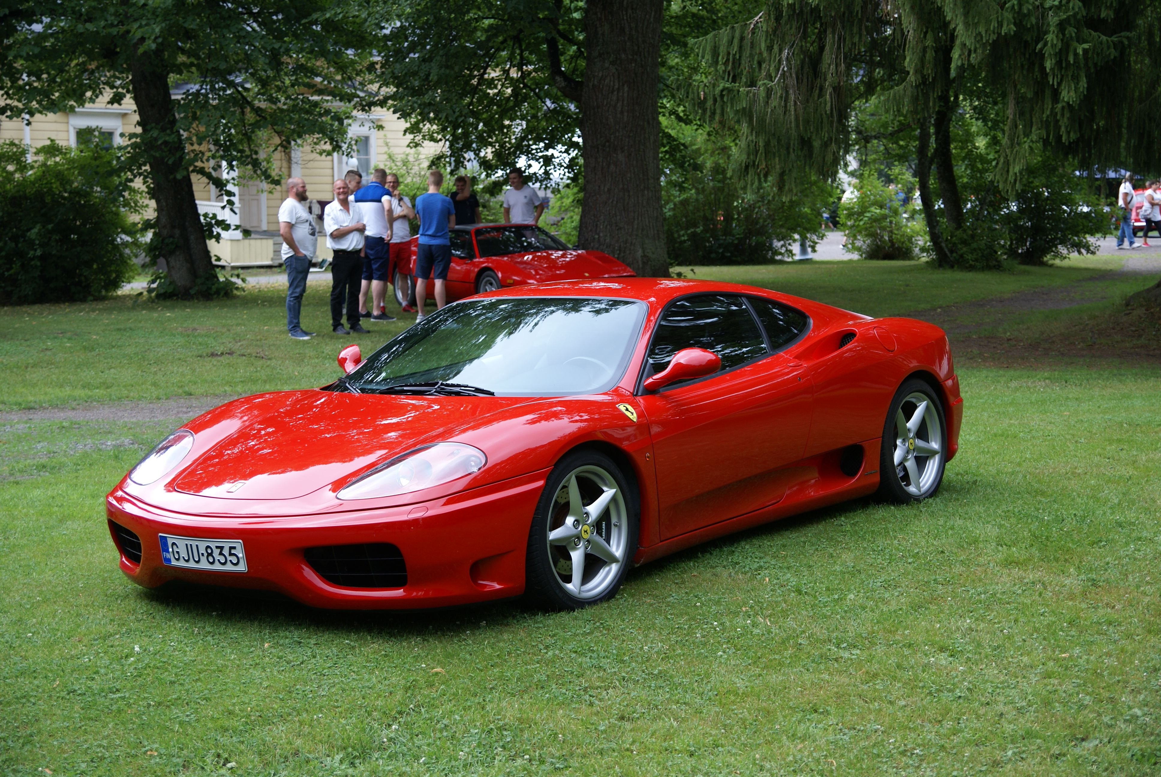 Ferrari 360 Modena Forssassa "Bella Italia" näyttelyssä.